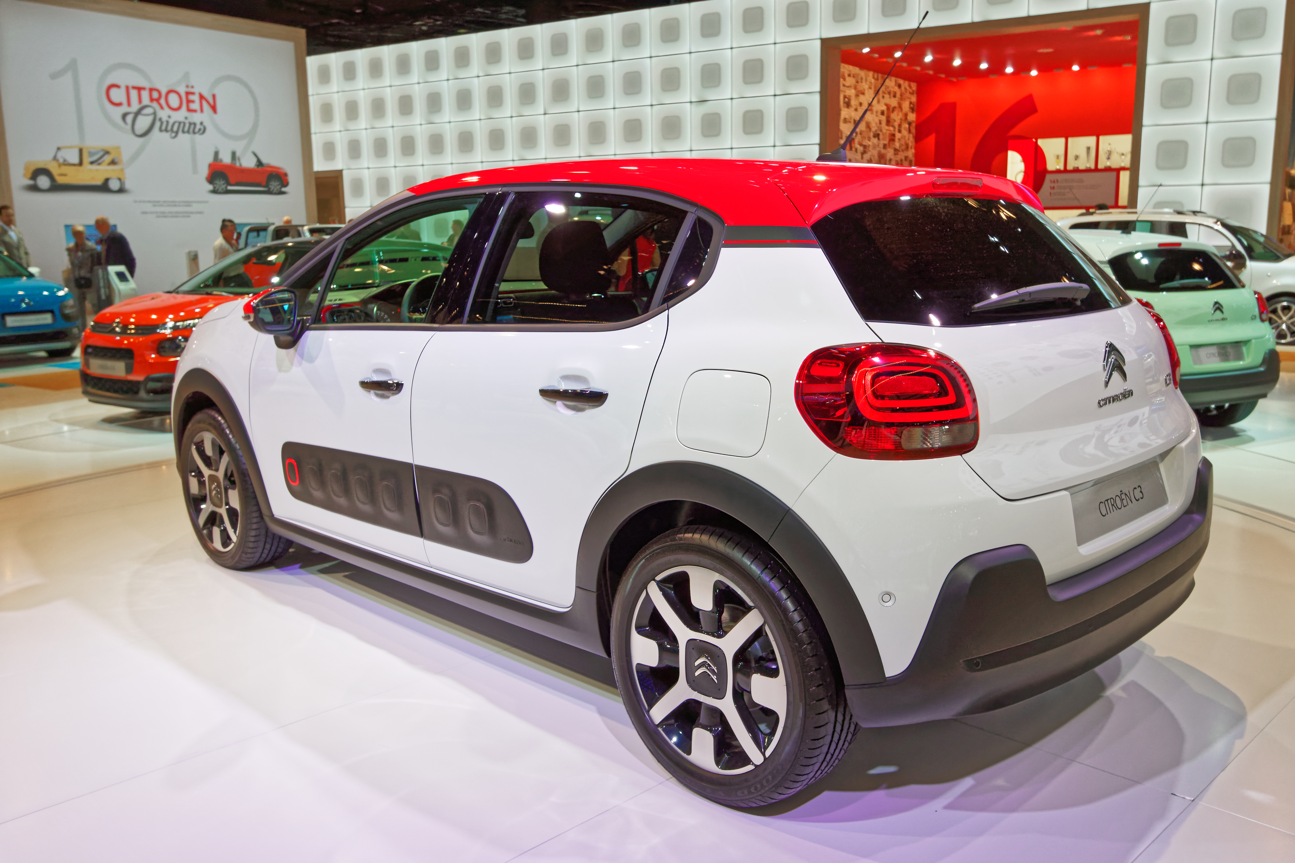 Une Citroën C3 présentée lors du mondial de l'automobile de Paris 2016.